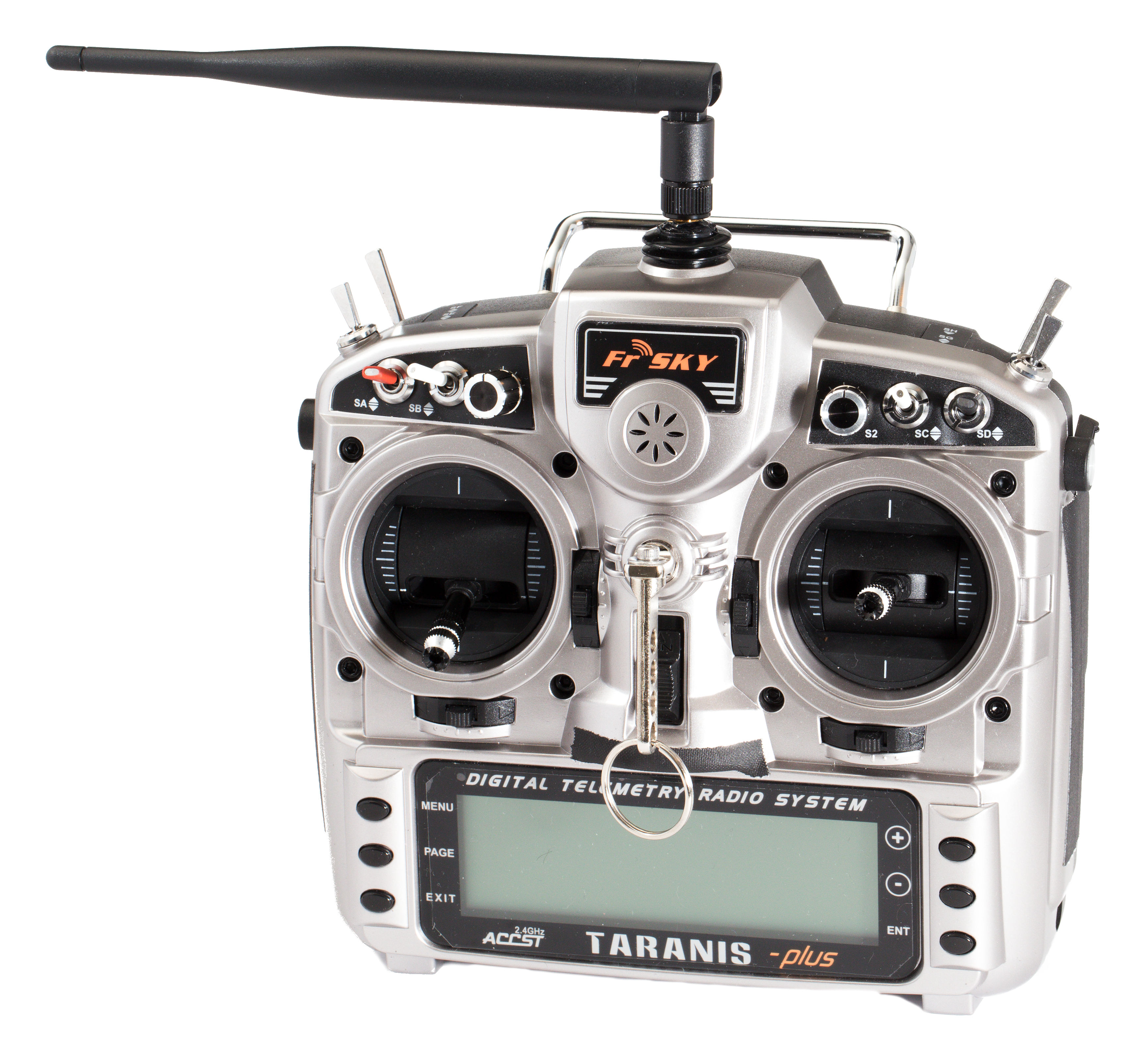 FrSky X9D Taranis plus Funkfernsteuerung für Modellbau / fergesteuerte Geräte.